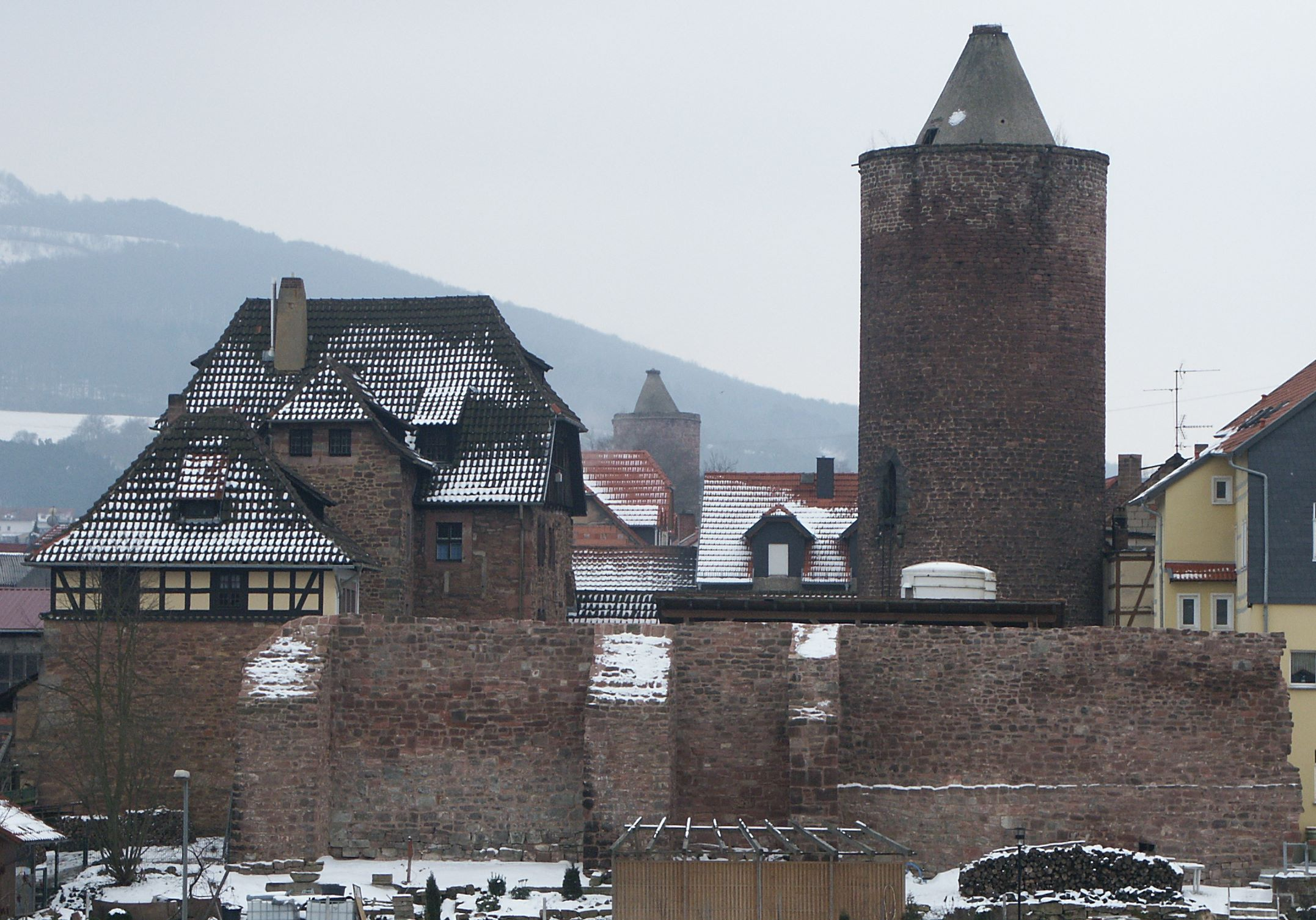 Burg Wendelstein von außerhalb der Stadt fotografiert.